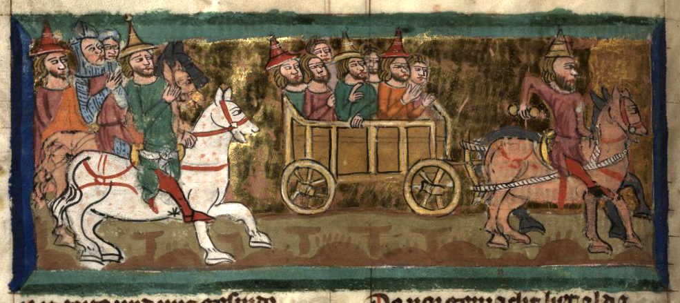 Rudolf von Ems: Weltchronik. Böhmen (Prag), 3. Viertel 14. Jahrhundert. Hochschul- und Landesbibliothek Fulda, Aa 88. Bildbeschreibung nach Martin Roland. Miniatur 32 75v Jakobs Reise nach Ägypten